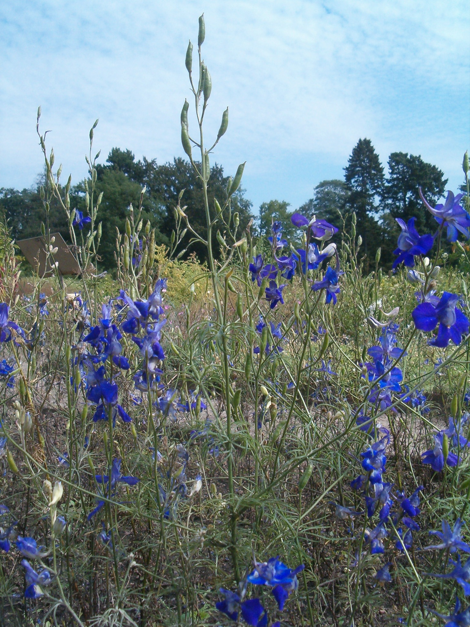 At Botanical Gardens Berlin-Dahlem Species Consolida ajacis